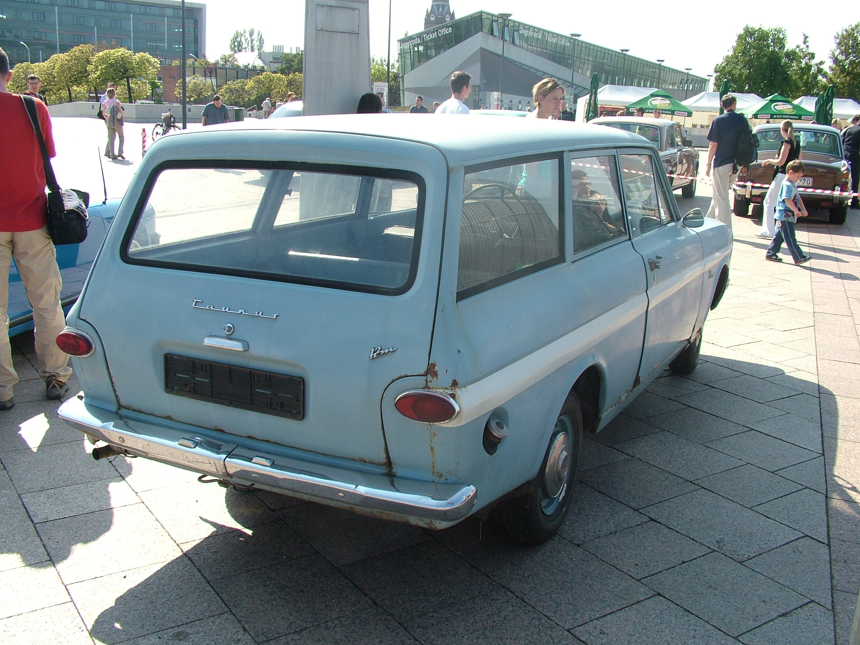 Ford Taunus 12m Turnier for sale